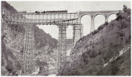 Bau des Eisenbahnviadukts über den Astico